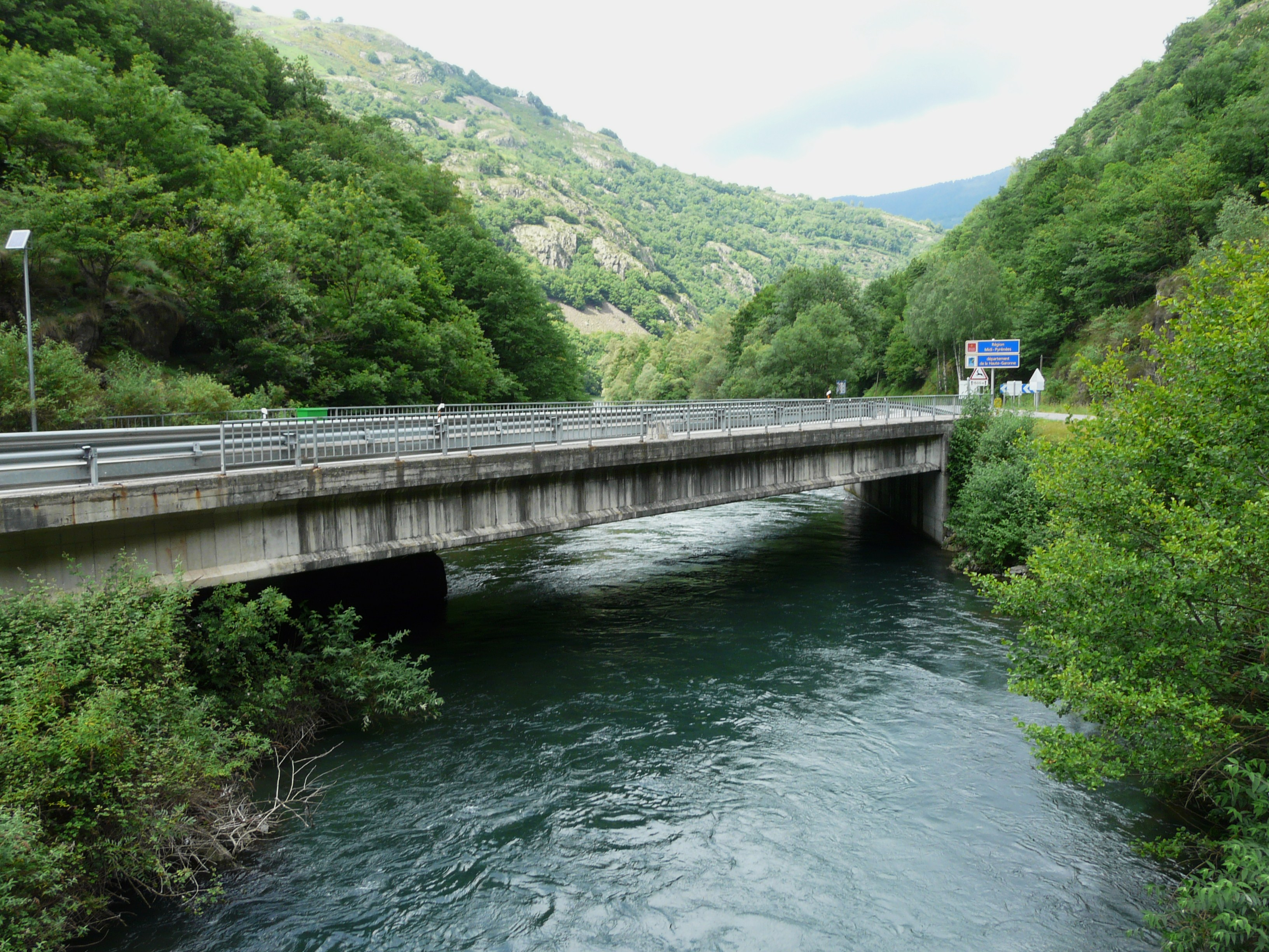 Le pont et la Garonne marquent la frontière entre l'Espagne (route nationale 230, Bausen, à gauche) et la France (route nationale 125, Fos, Haute-Garonne, à droite).